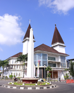 Gereja Silo (GPM Silo) adalah suatu gereja Protestan paling utama di Ambon selain gereja Maranatha jemaat Ambon. Di depan gereja terdapat Tugu Trikora.